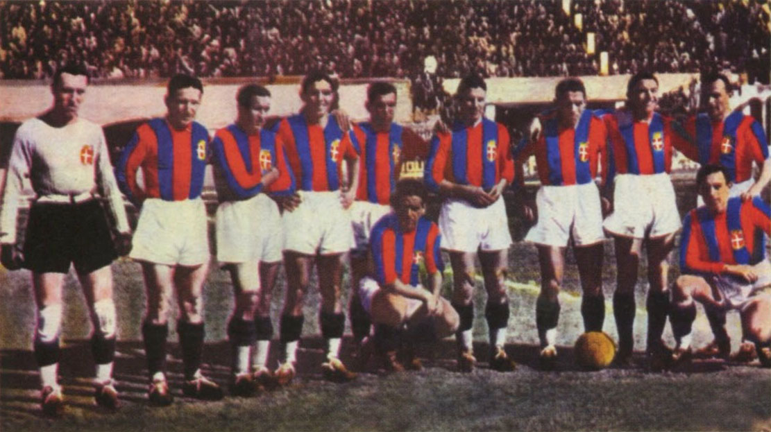 A line-up of Bologna A.G.C. in the 1936–37 season. From left to right, standing: C. Ceresoli, G. Corsi, M. Andreolo, D. Fiorini, R. Sansone, B. Maini, M. Pagotto, G. Busoni, A. Biavati; crouched: F. Fedullo, C. Reguzzoni.